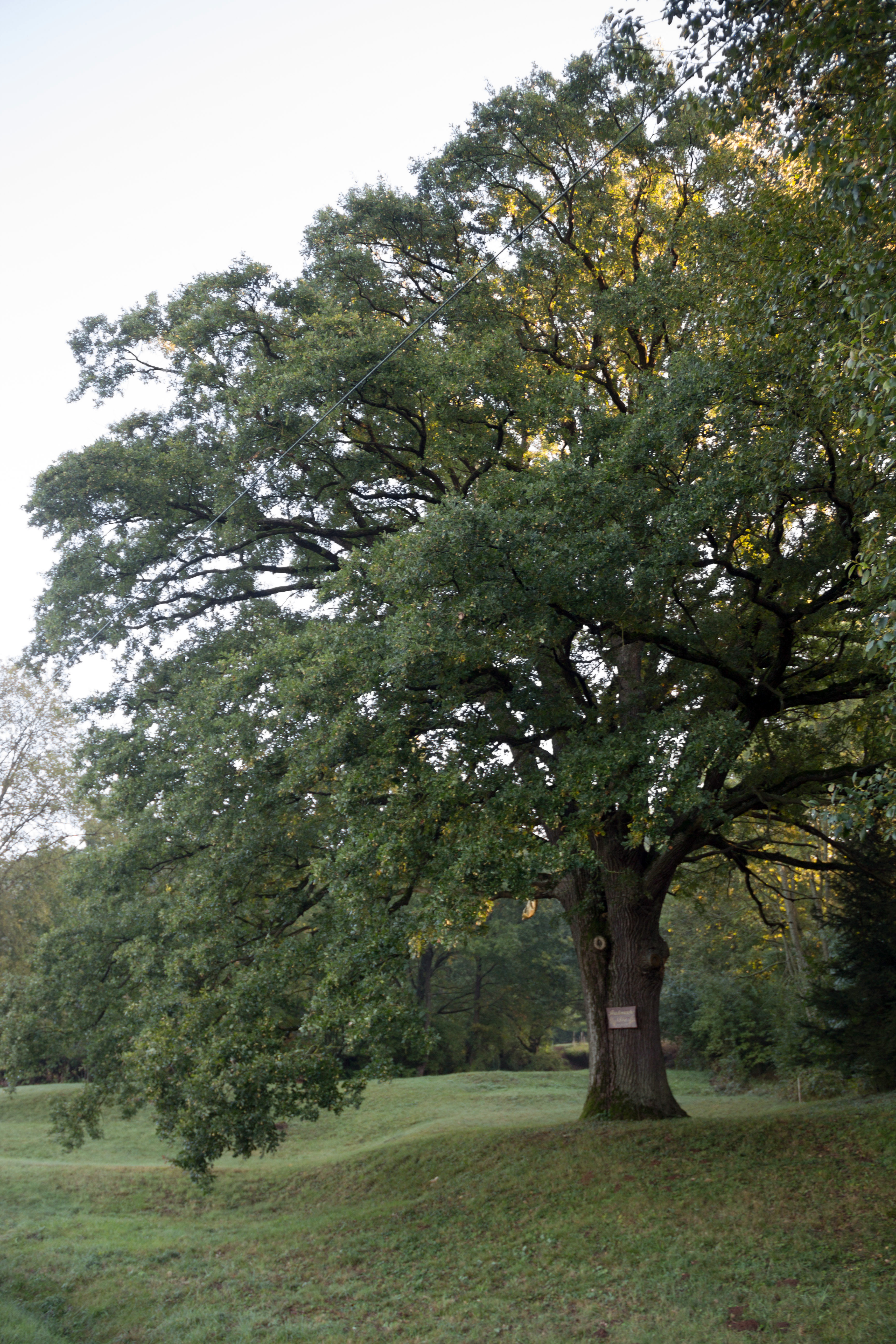 Friedenseiche bei Kucha, Naturdenkmal